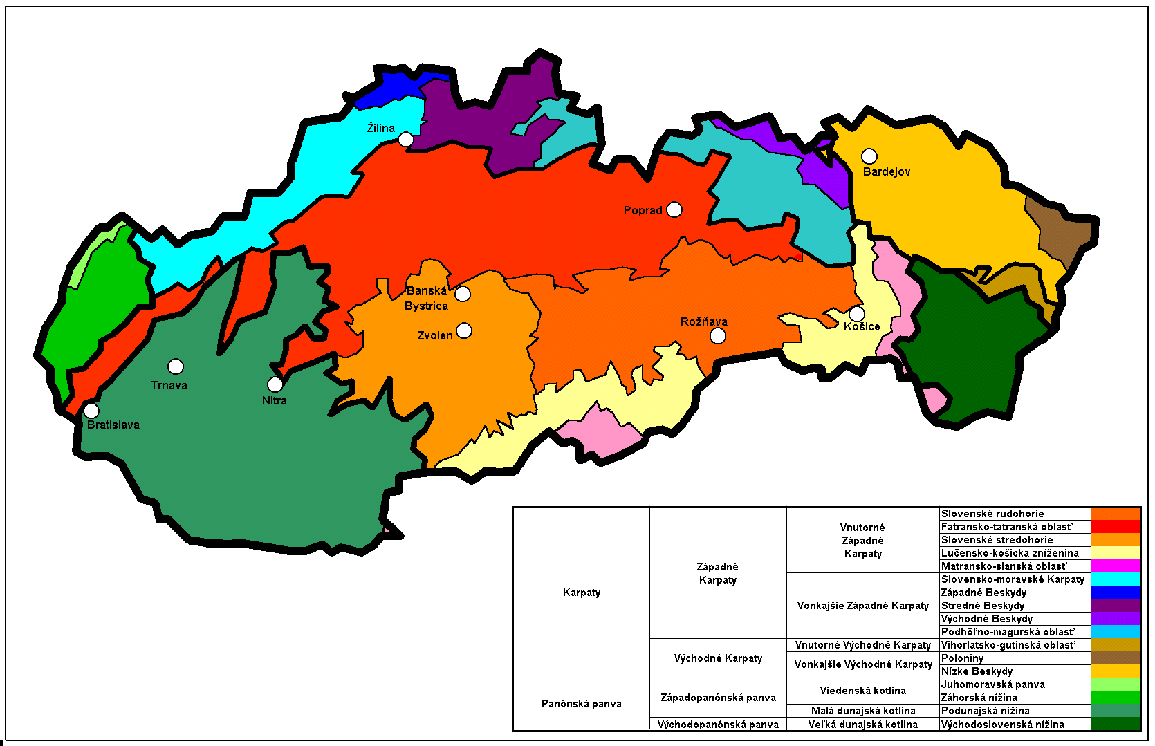 Geomorphologische_Einteilung_der_Slowakei